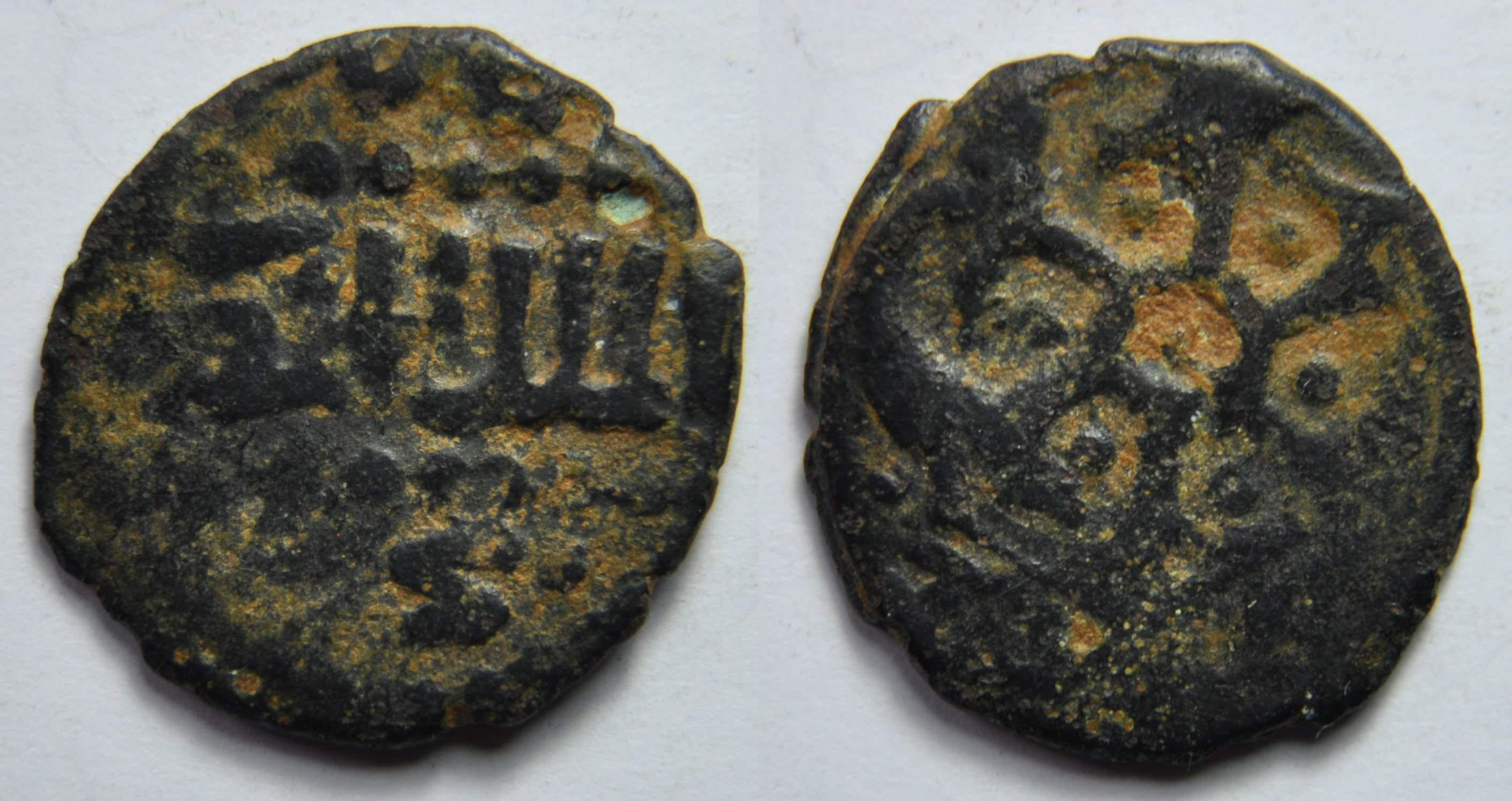 Une monnaie d'un fals en bronze de Al Mansour Ala al din Ali, sultan bahrite mamelouk (AH 778-783 / 1376-1381 AD), émise à Hamah. A/ Inscription R/ Tétralobe Dimension : 18 mm Poids : 2,1 g. Pas de référence.